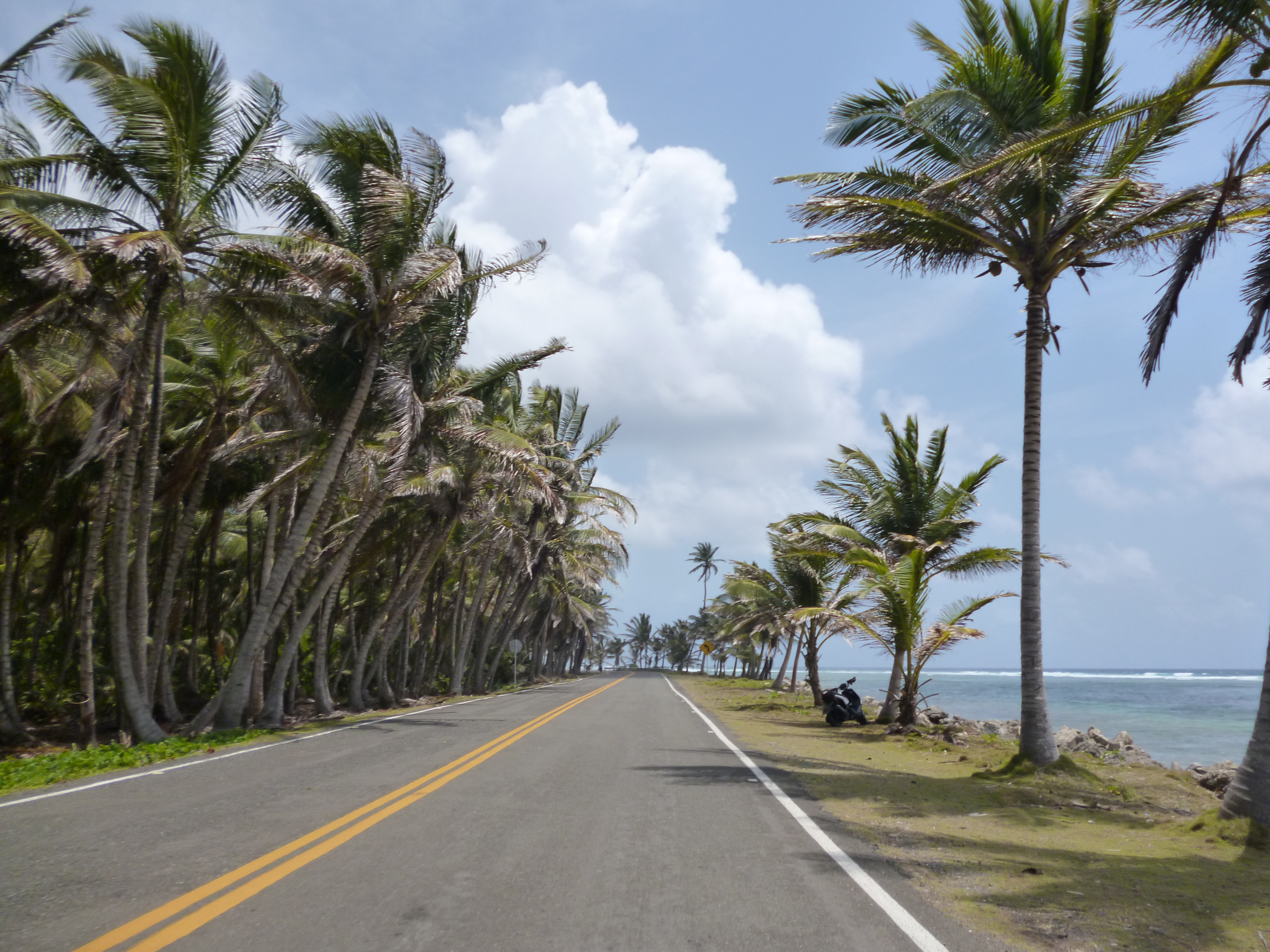 Carretera que recorre toda la isla de San Andrés